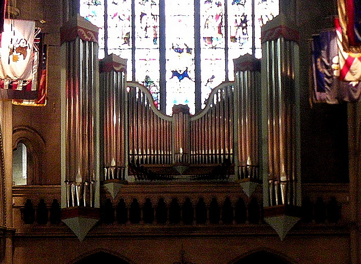 Intérieur de la cathédrale américaine de la Sainte-Trinité de Paris (75008). Nef vue vers l'entrée principale.